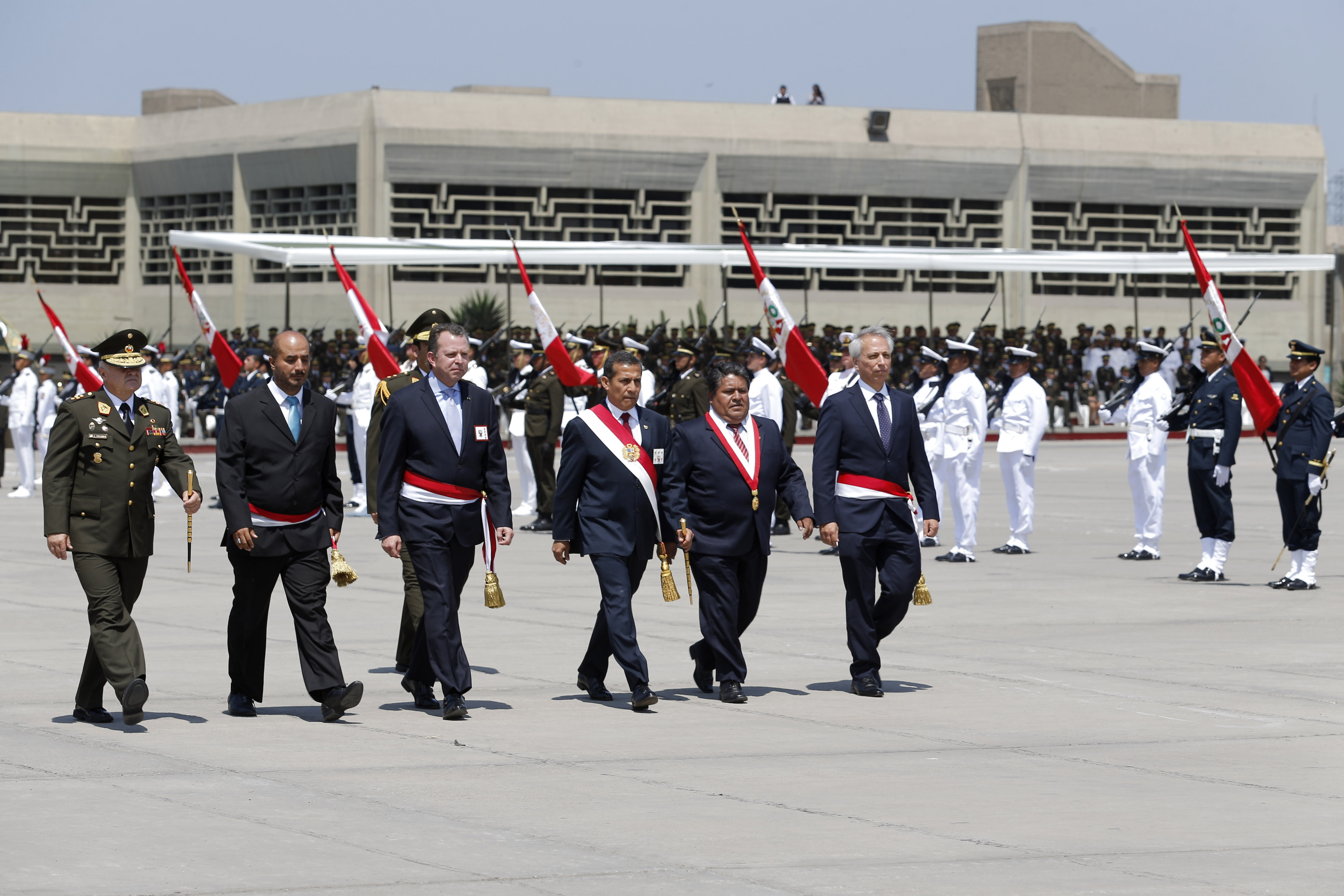 Afirmó el Ministro de Defensa, Jakke Valakivi, en la ceremonia por el Día del Ejército y 191 años de la Batalla de Ayacucho En el acto castrense que estuvo presidido por el mandatario Ollanta Humala, el Ministro de Defensa, Jakke Valakivi aseguró que el ejército peruano de hoy se encuentra mejor equipado a comparación de otros tiempos. “Cuando afirmo que es el mejor, lo digo no solo por la renovación de material que ha experimentado durante este gobierno sino, muy especialmente, por la calidad profesional y humana de los hombres y mujeres que lo conforman”, señaló Valakivi durante su discurso pronunciado en la Plaza Cáceres del Cuartel General del Ejército.